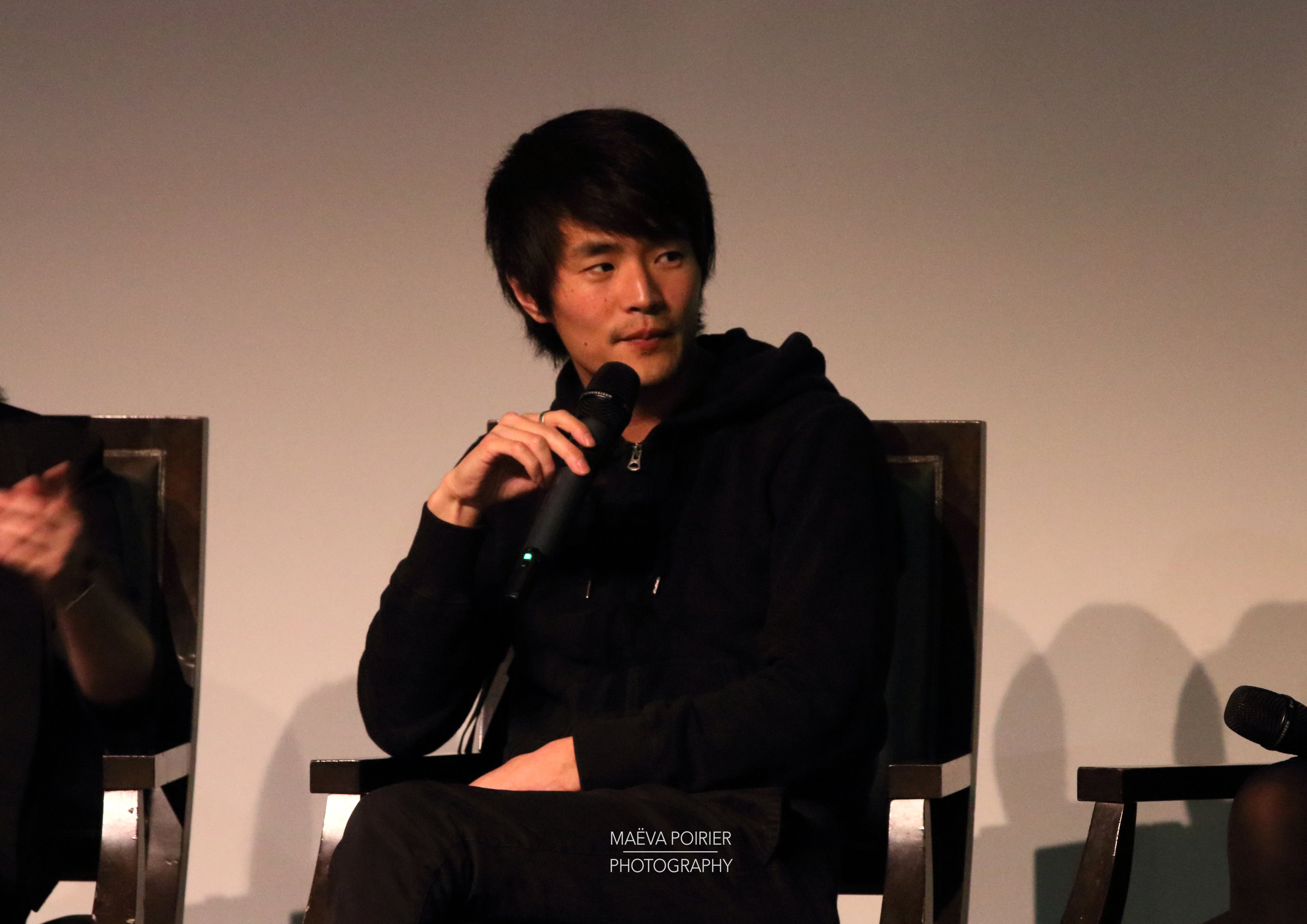 Merci de respecter le temps passé sur ces photos et de ne pas chercher à en retirer le copyright :) Si vous souhaitez placer une photo sur twitter ou facebook libre à vous, le copyright est là pour ça, mais je vous serais redevable de me créditer, (@mae_72va pour twitter) et de recopier les consignes, merci! :) Thanks respect the time spend on this pics and do not try to remove the copyright :) If you want take a pic you can, the copyright is here for this, but please credit me, (@mae_72va for twitter), thank you! :)